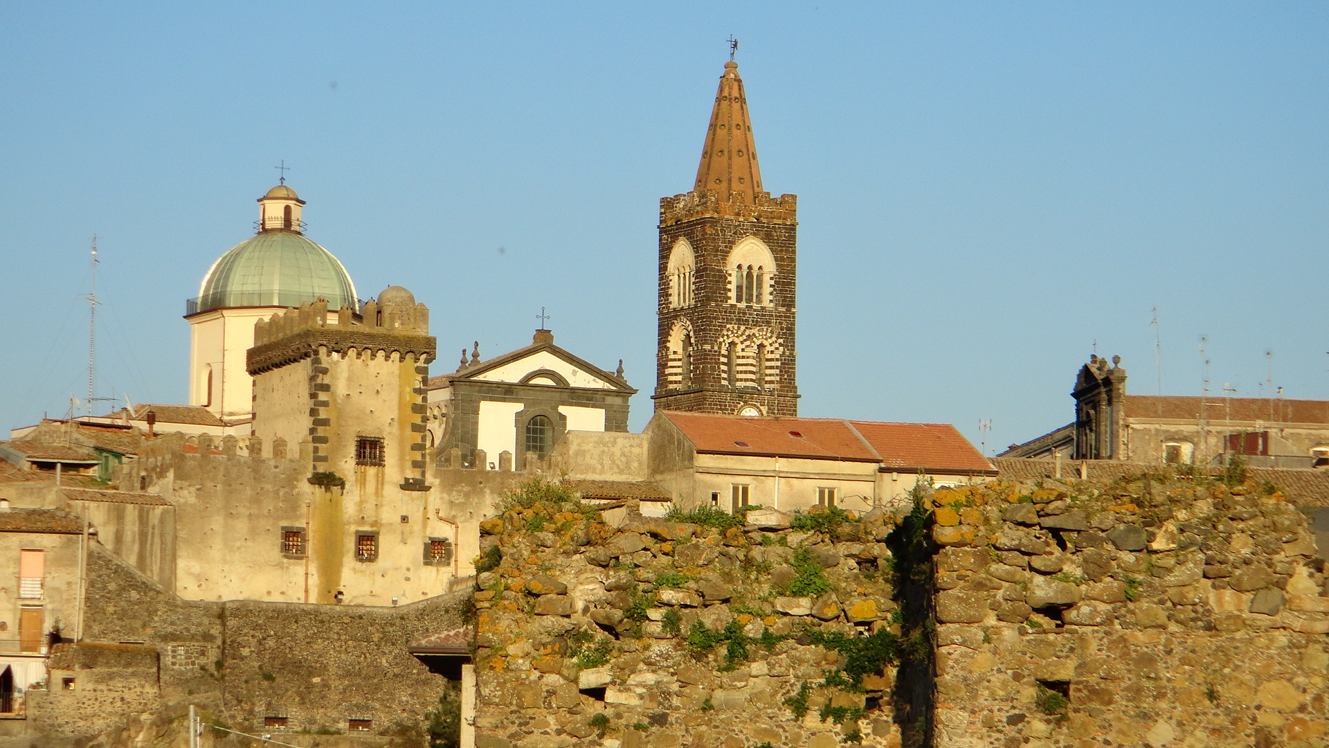 Castello This is a photo of a monument which is part of cultural heritage of Italy.